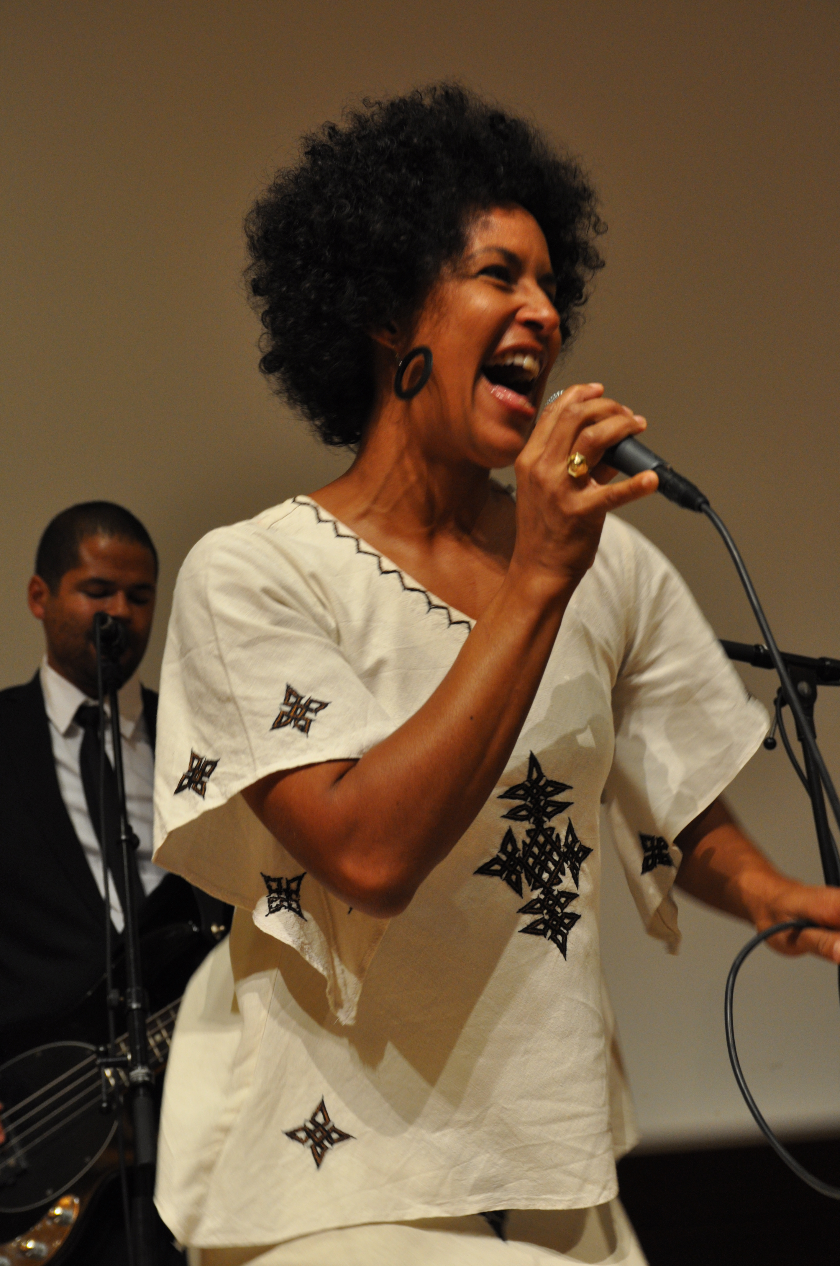 Asta Busingye Lydersen fra Queendom tente Norsk Folkehjelps landsmøte 2011